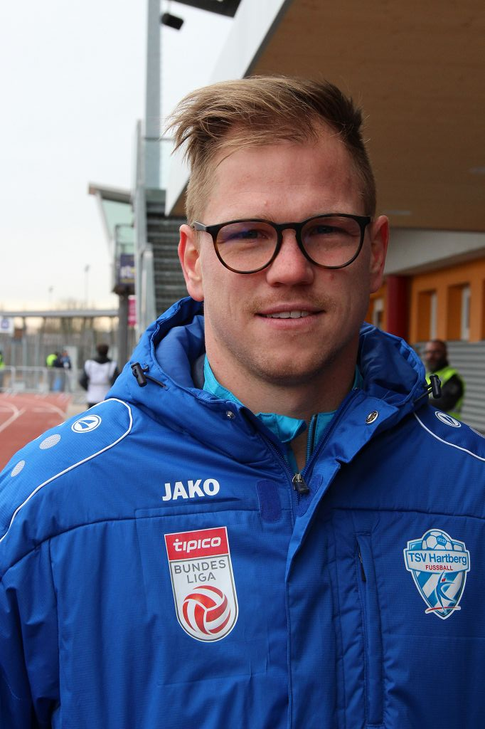 Florian Faist (Hartberg)